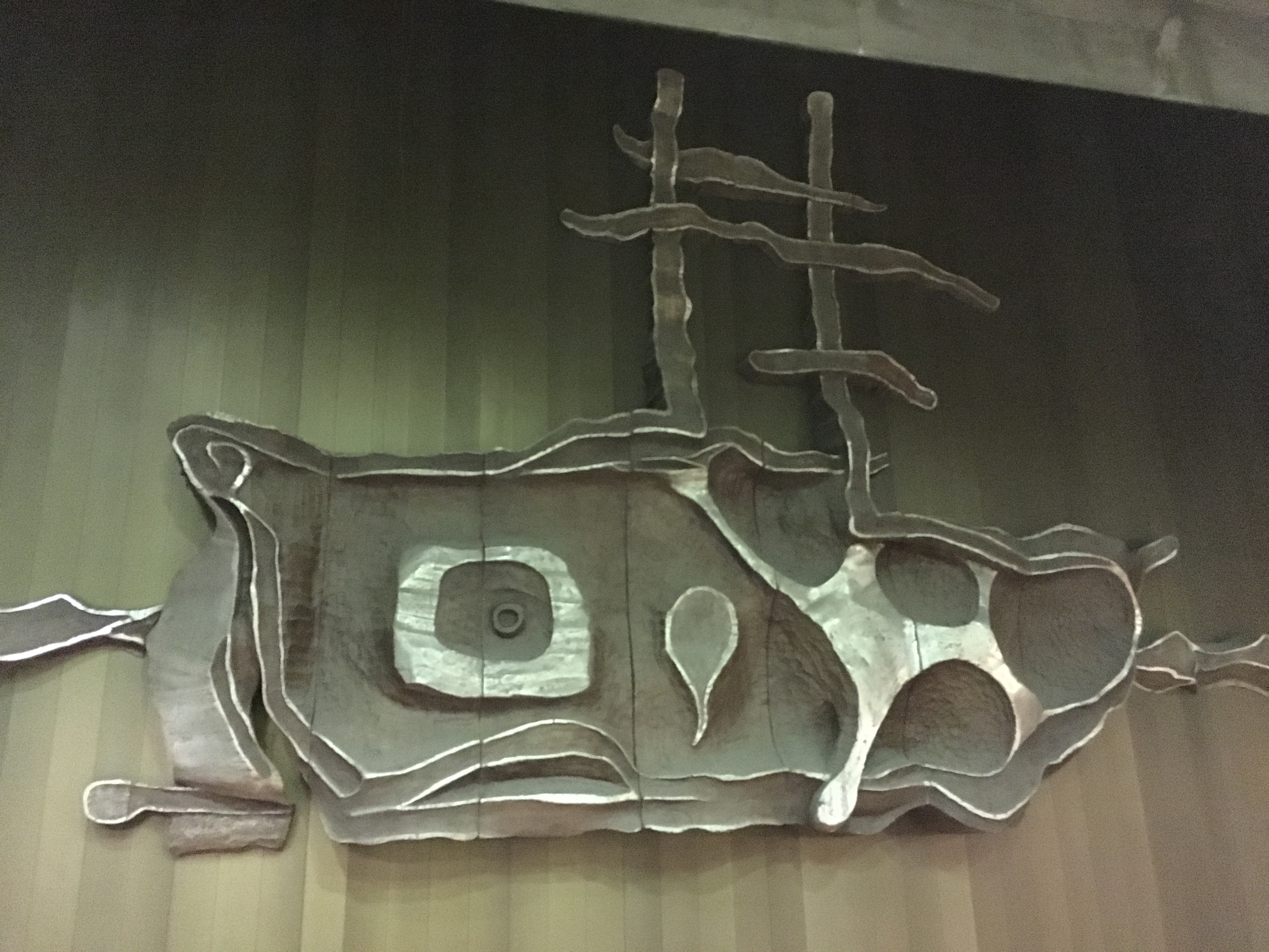 Œuvre "Le Pélican" de Eddy Tardif (1986) sur la mezzanine de la station D'Iberville du métro de Montréal. Le Pélican était le nom du vaisseau de guerre de l'explorateur et corsaire français Pierre Le Moyne d’Iberville lors de sa campagne de 1697 dans la baie d'Hudson.